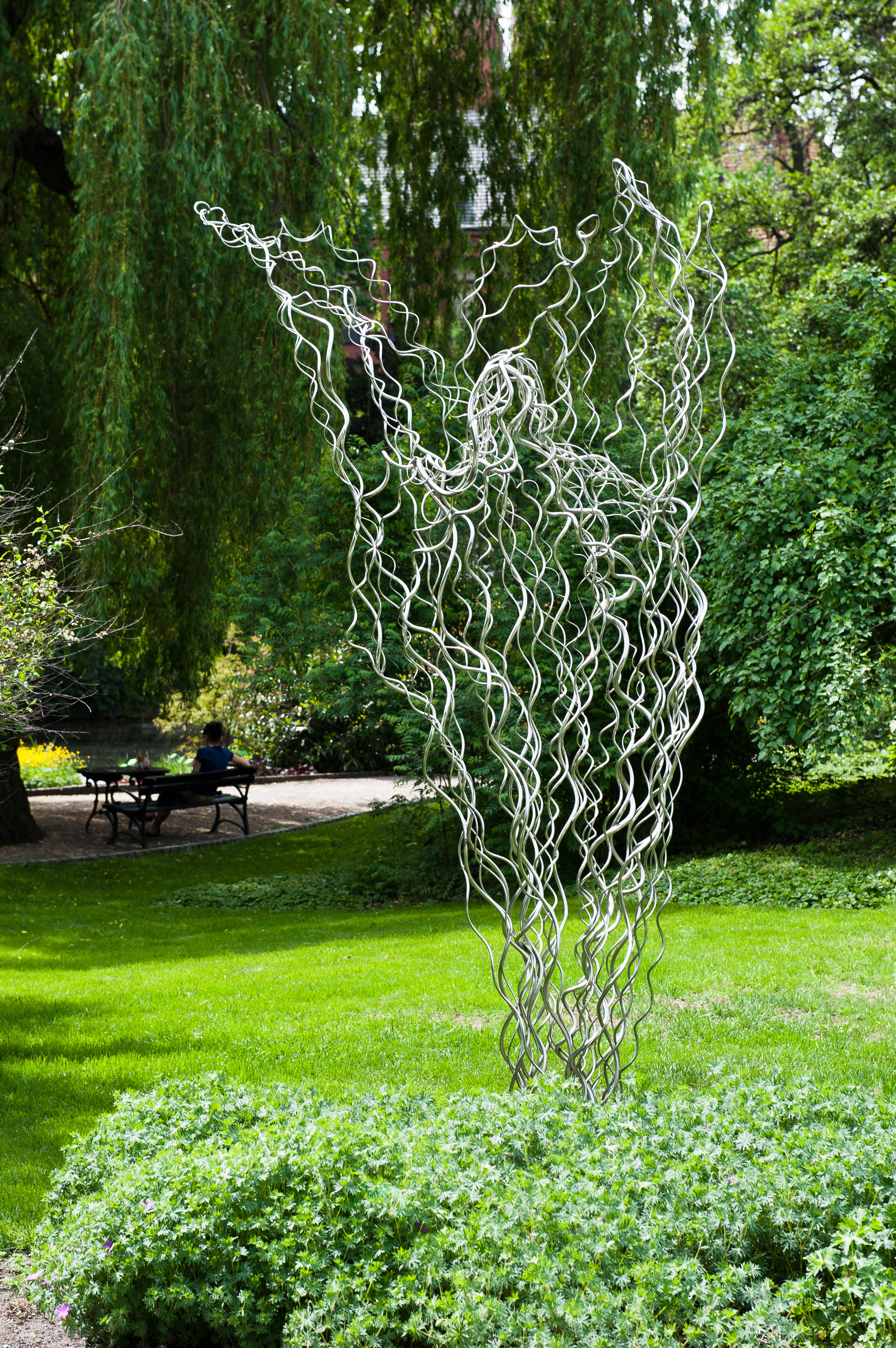 "Anioł" - rzeźba plenerowa w Ogrodzie Botanicznym Uniwersytetu Wrocławskiego. Elektropolerowana stal nierdzewna kwasoodporna, 4x2,54x2 [m], 2004